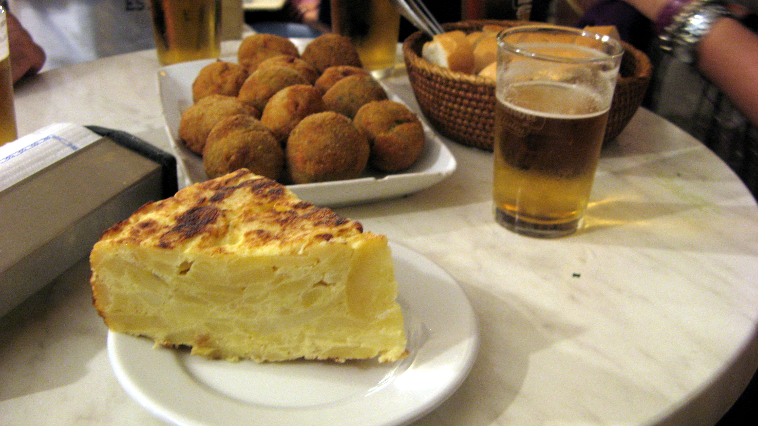 Una ración de tortilla de patatas, un plato de croquetas y una caña.